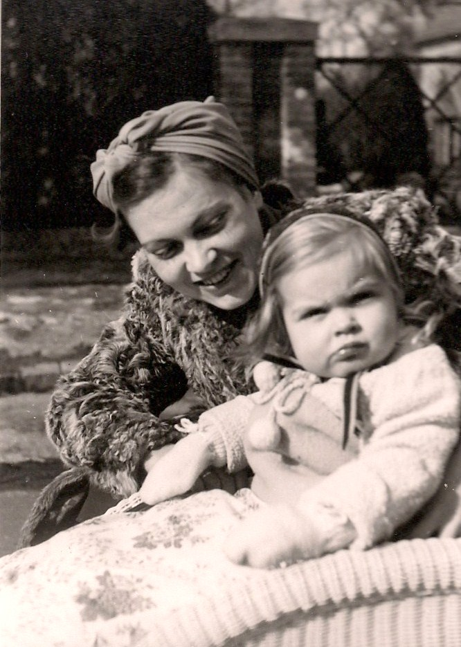 In Kriegszeiten wurde notgedrungen oft Kopftuchfrisur getragen